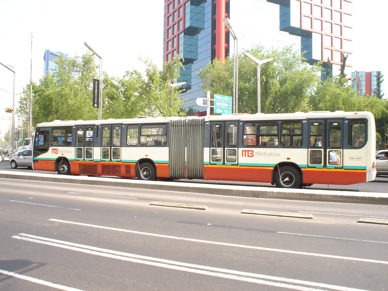 Metrobús en servicio.